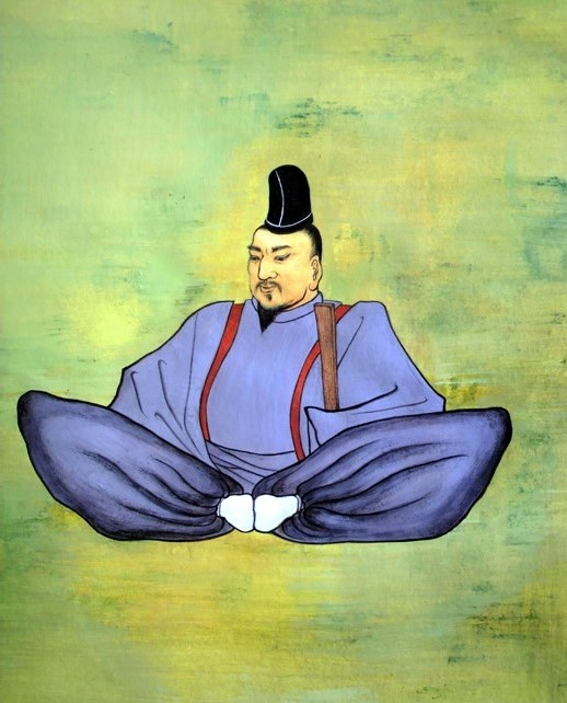 戸沢政盛の想像図。